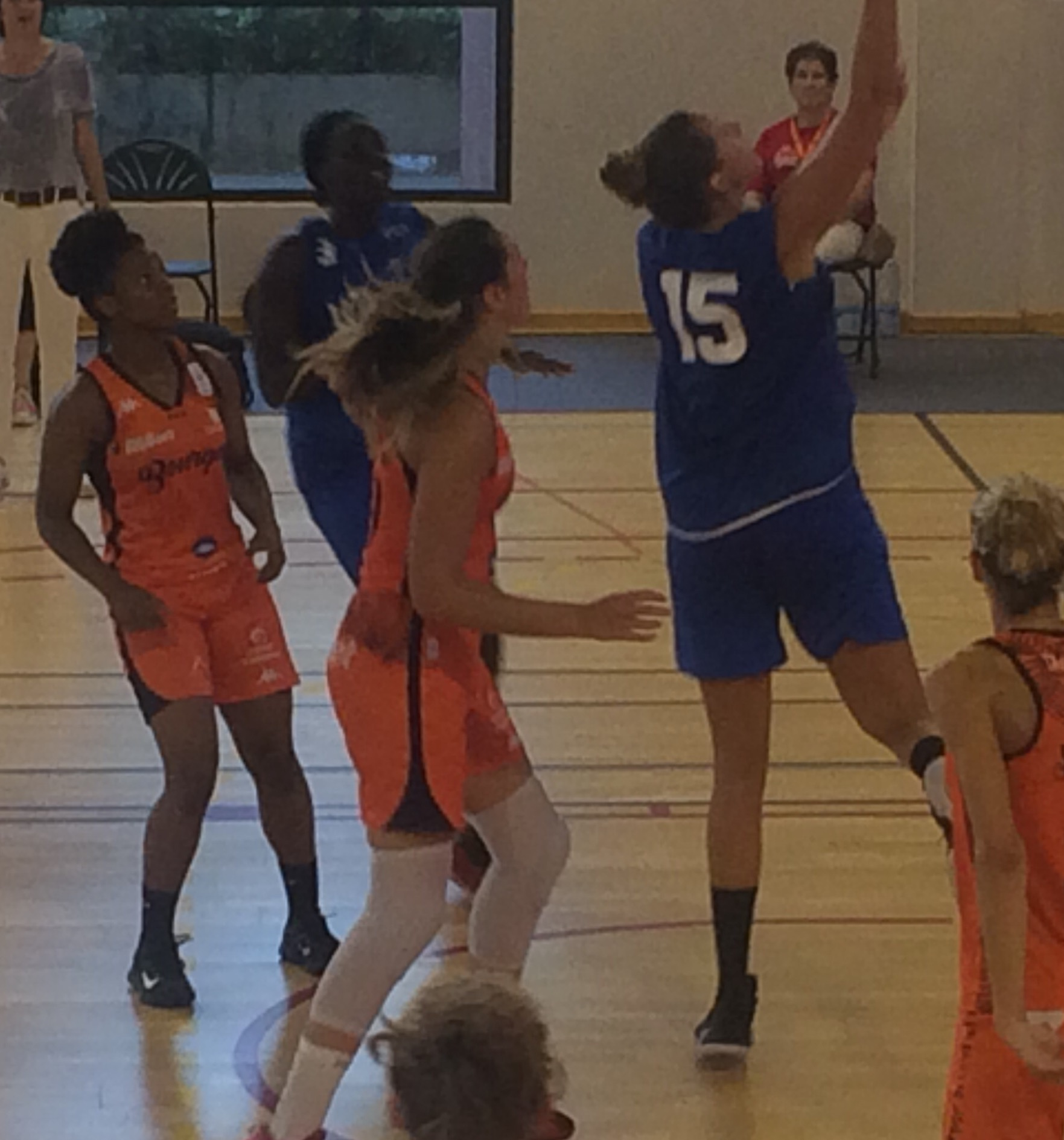 Les joueuses franaçaises Océane Monpierre, Alexia Chartereau et Angélina Turmel (de gauche à droite) lors d'une rencontre amicale opposant Angers aux Tango Bourges le 3 septembre 2016 aux Pavillons-sous-Bois